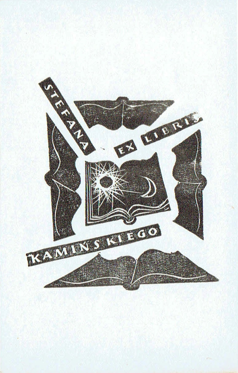 Ekslibris Stefana Kamińskiego (1907–1974) – księgarza, antykwariusza, wydawcy i bibliofila krakowskiego.